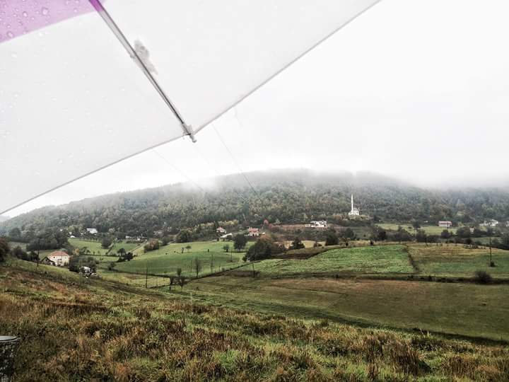 Selo Mitrova